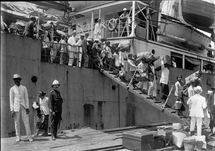 Foto. De aankomst per schip van Javaanse immigranten in Paramaribo.